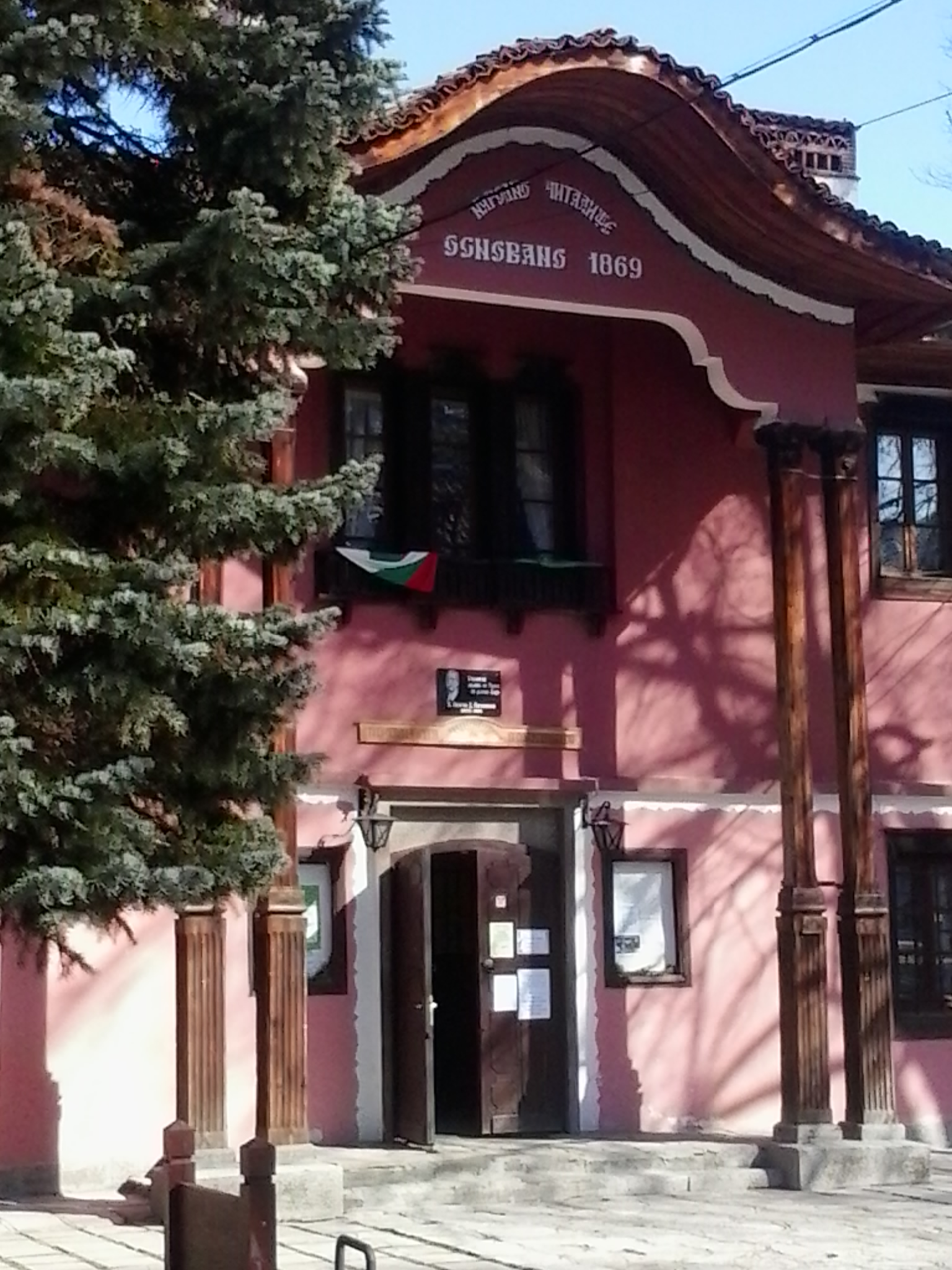 Народно Читалище